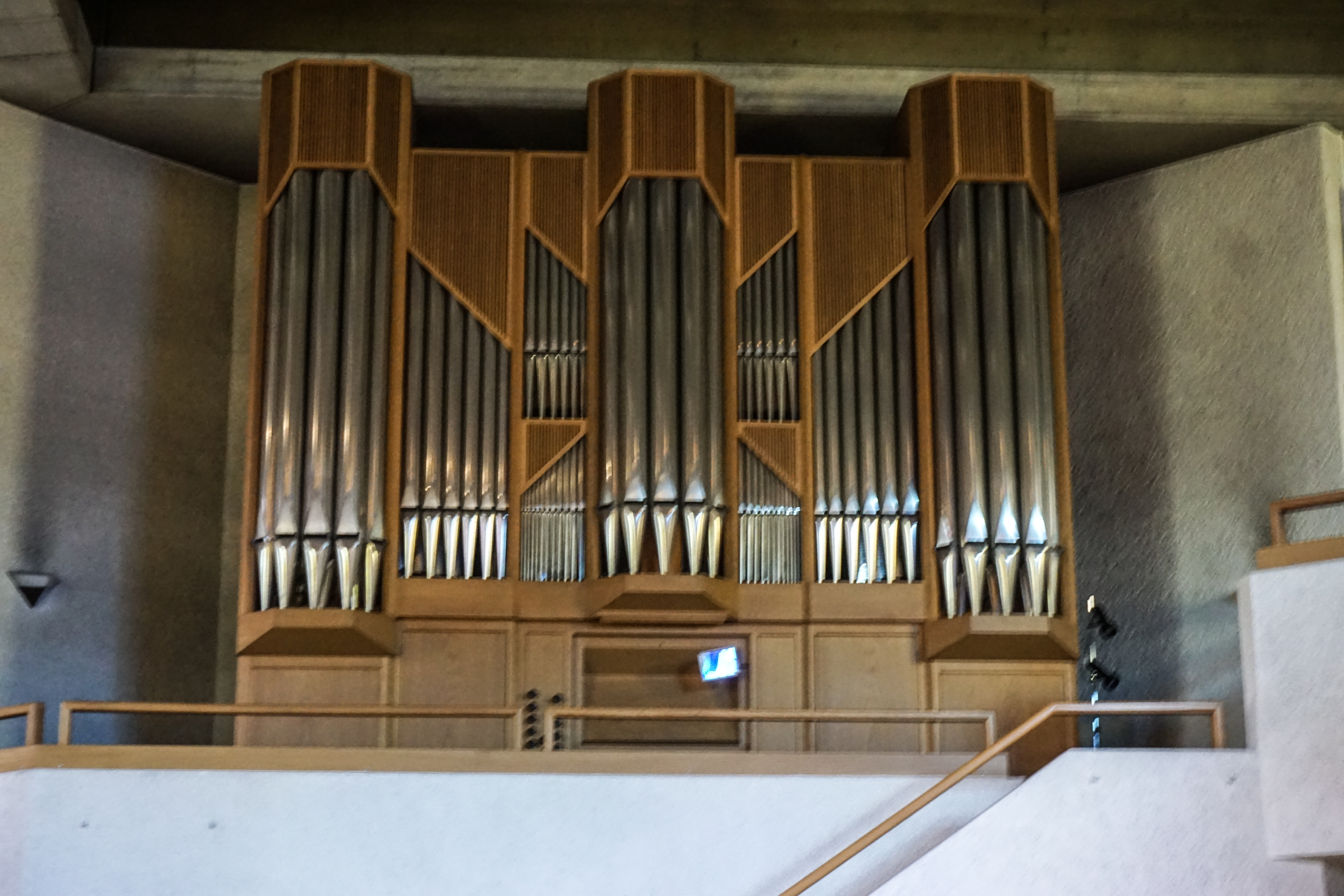 Orgel